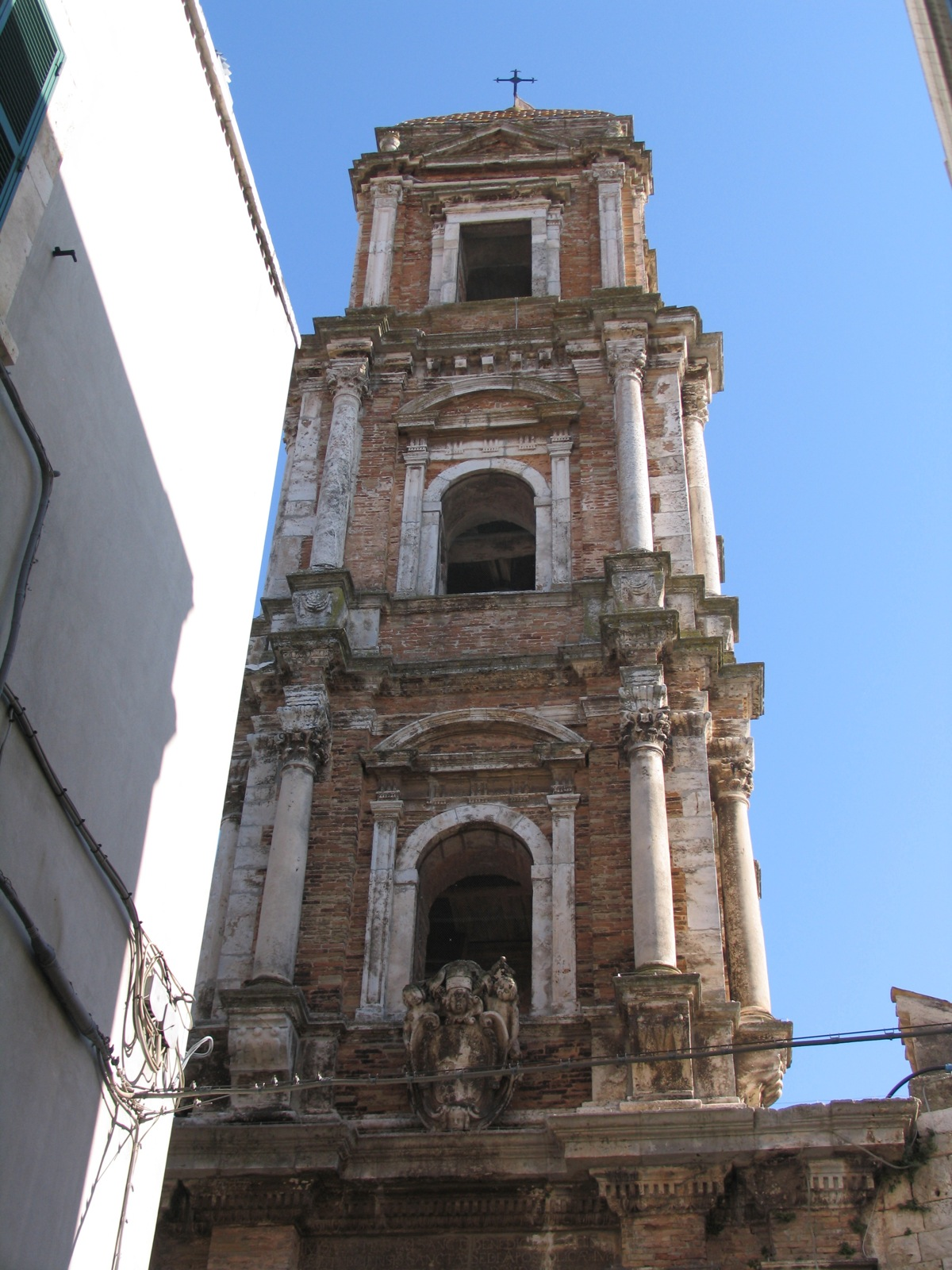 Conversano, Puglia, Italia